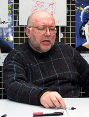 Tekenaar van Urbanus strip, willy linthout